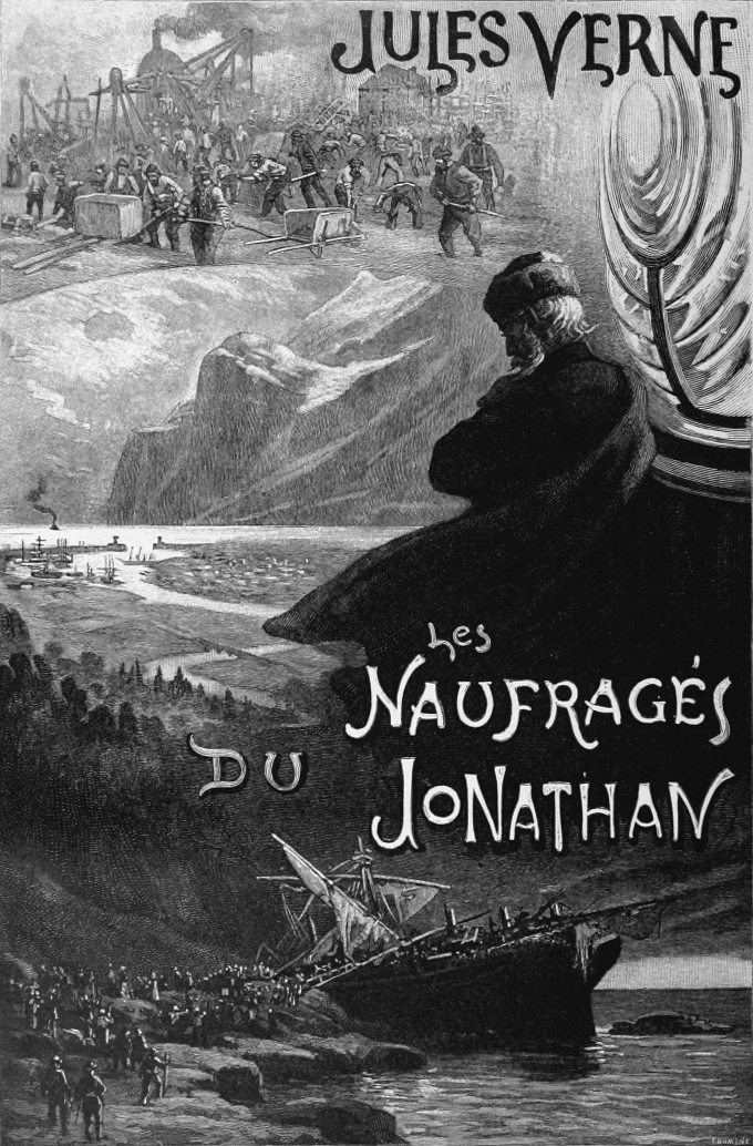 Illustration from Verne - Les Naufragés du Jonathan, Hetzel, 1909.djvu